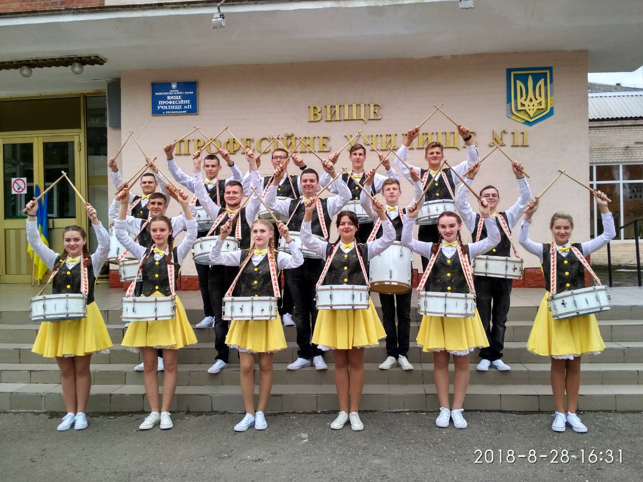 Учасники ансамблю барабанщиків «Запальні ритми» (« Fire rhythms») біля Державного навчального закладу "Вище професійне училище №11 м. Хмельницький"